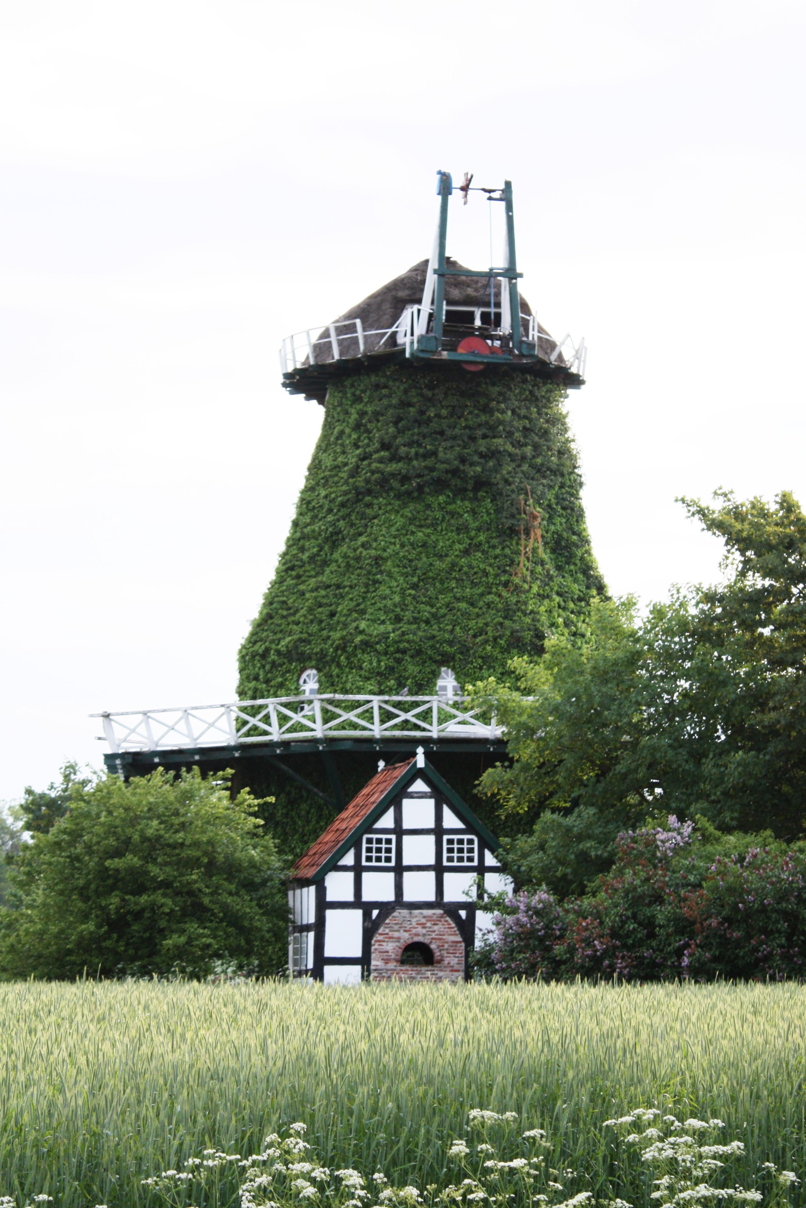 Barver, alte Windmühle